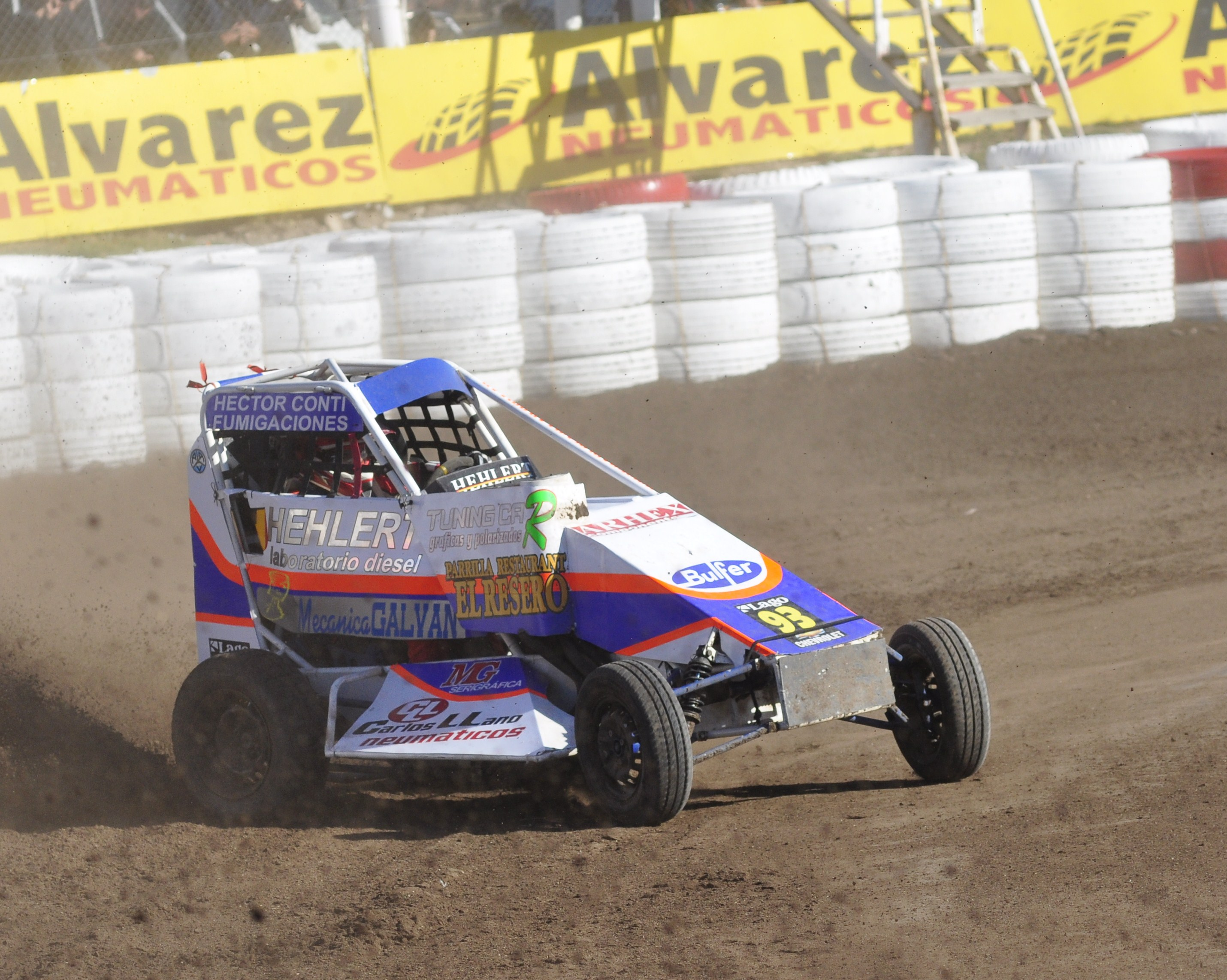 Categoria de Autos de carreras